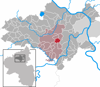 Rüber in Rhineland-Palatinate - district Mayen-Koblenz